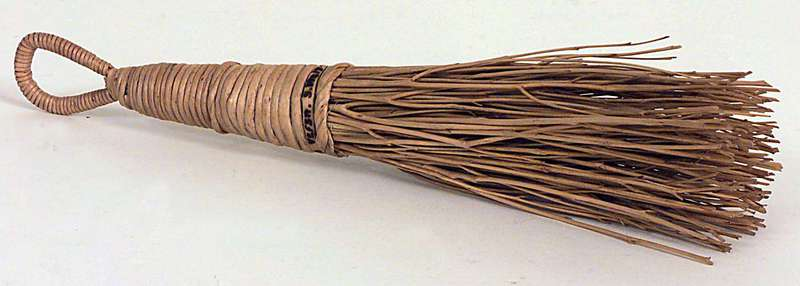 Visp laget omkring 1890 av bjørkekvister som er surret med pil. Lengde 28 cm. Norsk Folkemuseum. NF.1950-0089.